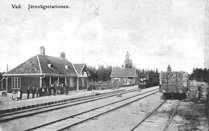 Vad, järnvägsstationen, 1907. Foto efter gammalt vykort